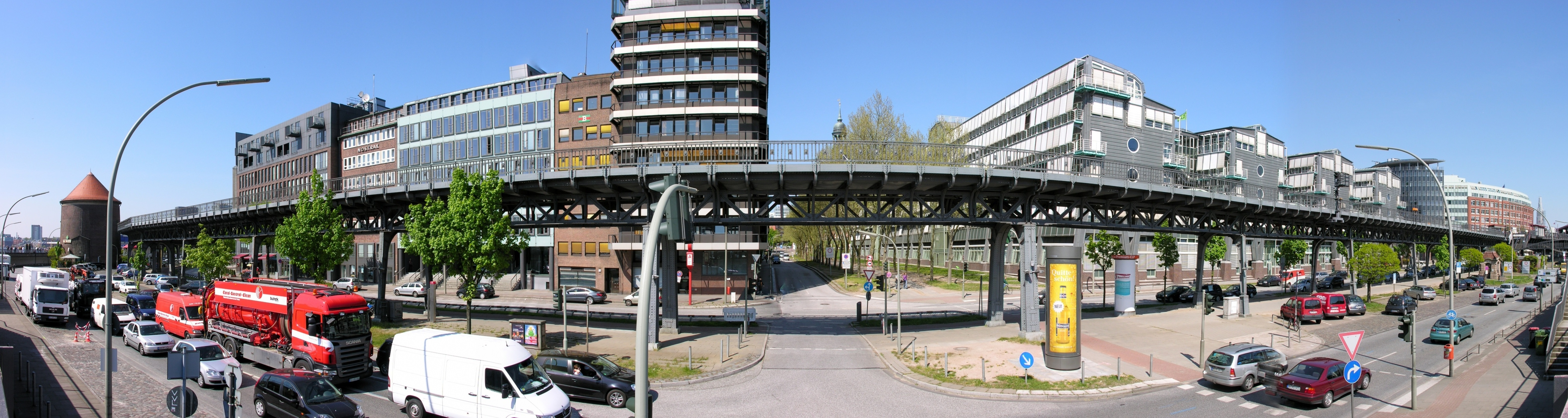 Germany, Hamburg, Blick auf die Hochbahnstrecke zwischen den Haltestellen Baumwall und Landungsbrücken